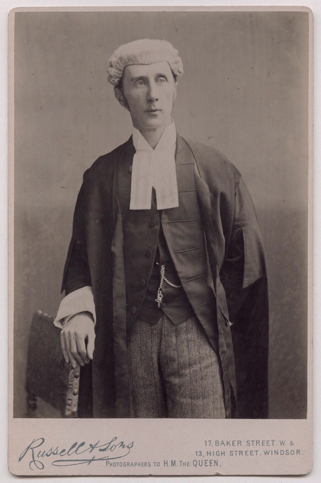 Carte de visite of Henry Fielding Dickens (1849–1933)